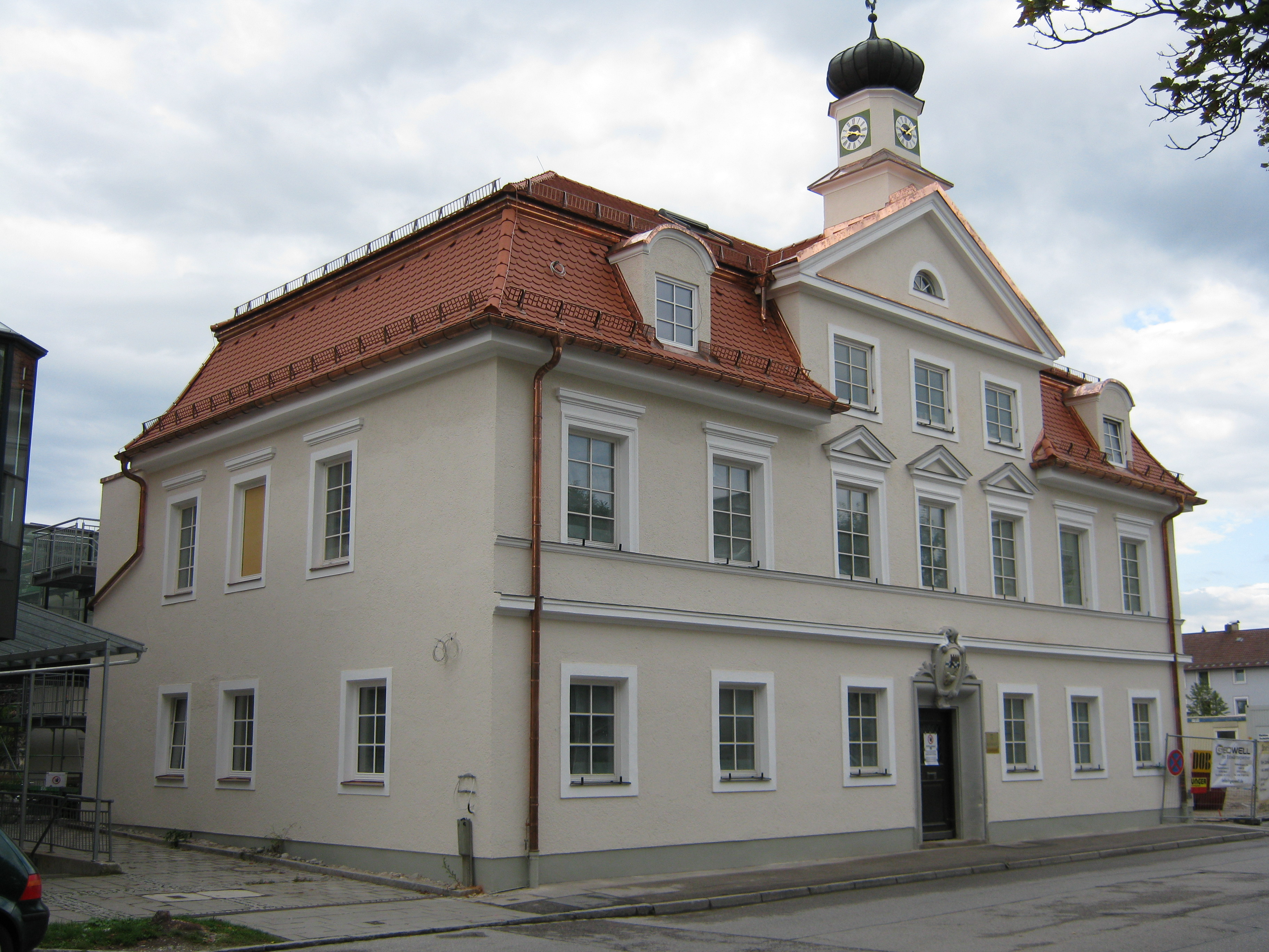 Penzberg-Denkmalgeschützte Häuser Rathaus Penzberg.JPG